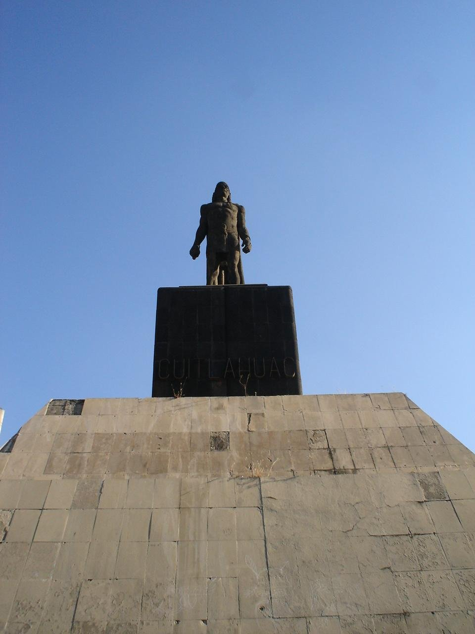 Monumento a Cuitláhuac, ubicado en la tercera glorieta de la prolongación del Paseo de la Reforma, a la que convergen las calles de Ricardo Flores Magón, Matamoros y Comonfort, en la Colonia Guerrero. El monumento fue proyectado por el arquitecto Jesús Aguirre e inaugurado el 21 de noviembre de 1964. (Ciudad de México, D.F., México).